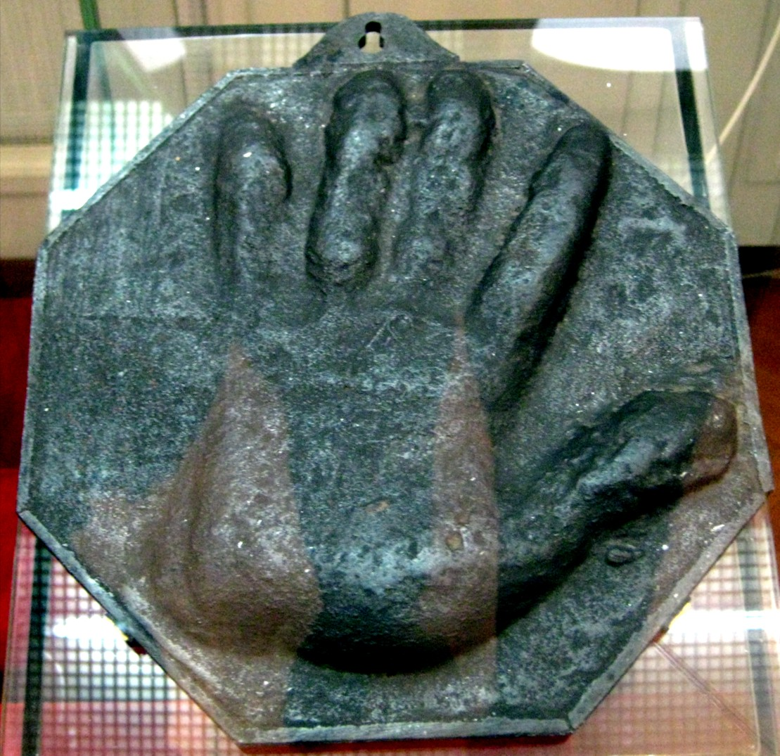 Death mask of Peter I of Russia's hand. Слепок руки Петра Великого